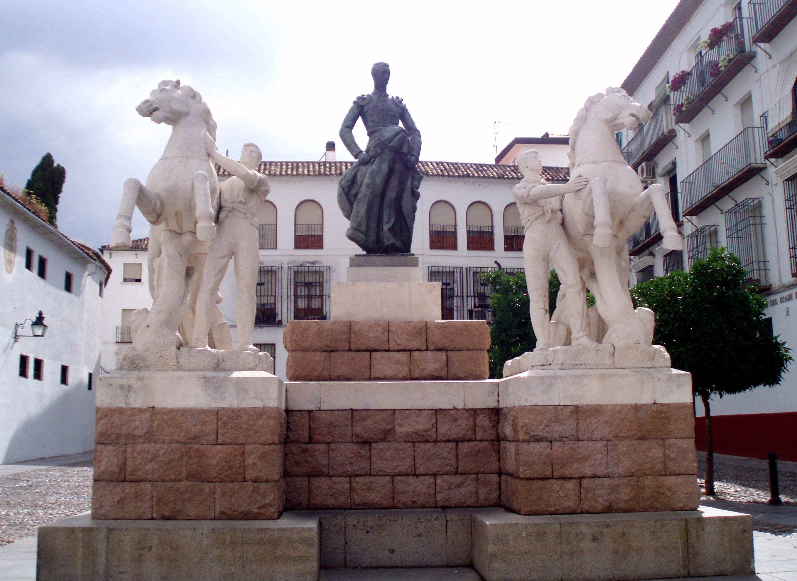 Monumento a Manolete de la ciudad de Córdoba, situado cerca de la Iglesia de Santa Marina de Aguas Santas (España).